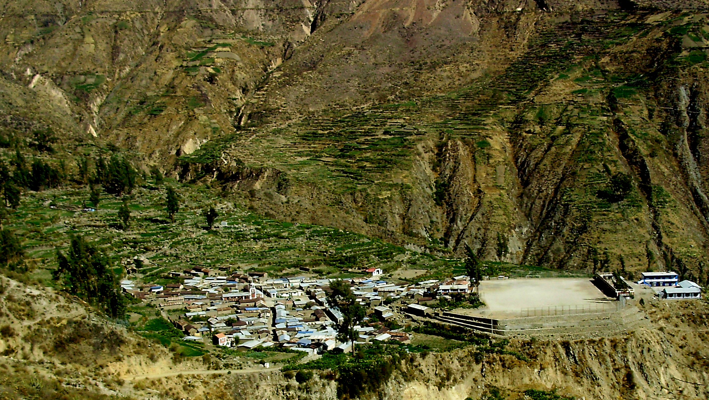 Vista panonámina del centro poblado de Muylaque, distrito de San Cristobal (Calacoa), provincia de Mariscal Nieto, región de Moquegua.